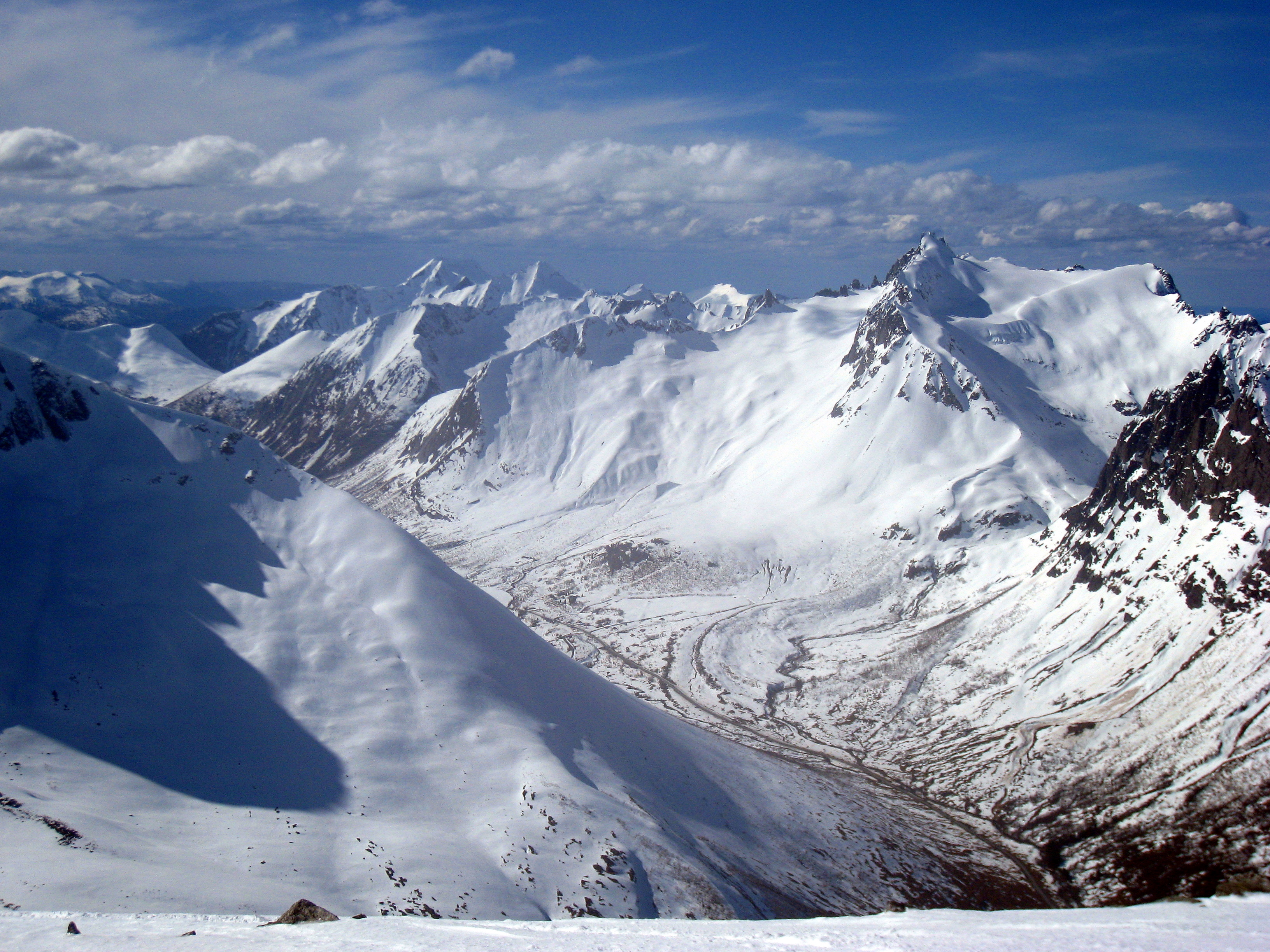 Sunnmørsalpane